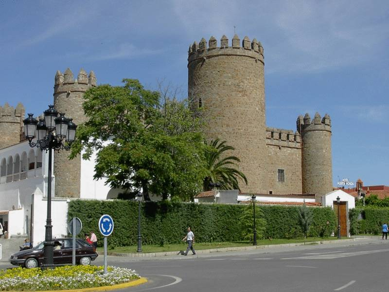 es: Castillo de Zafra gl: Castelo de Zafra pt: Castelo de Zafra (Guadalajara)